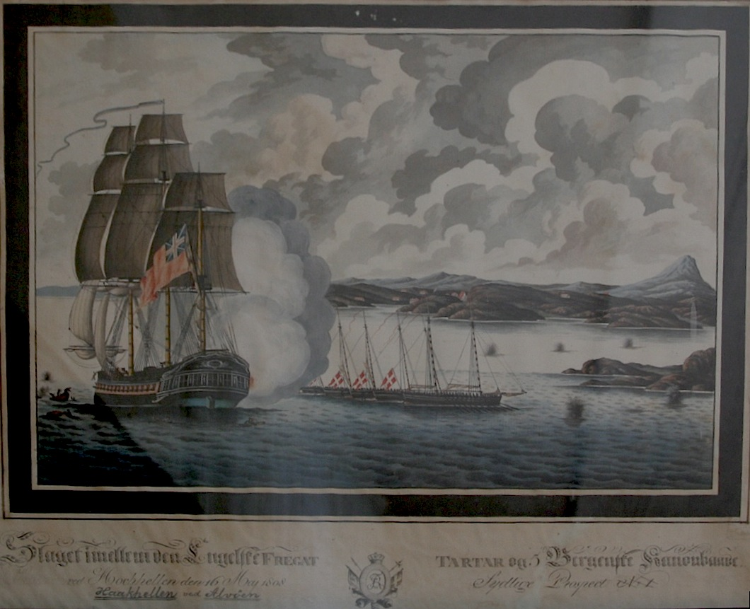 Prospekt of slaget ved Alvøen 1807